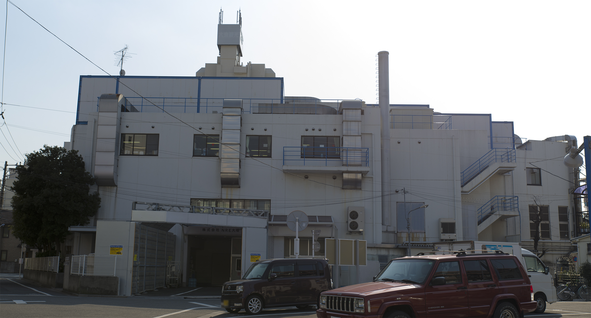 NRE大増本社